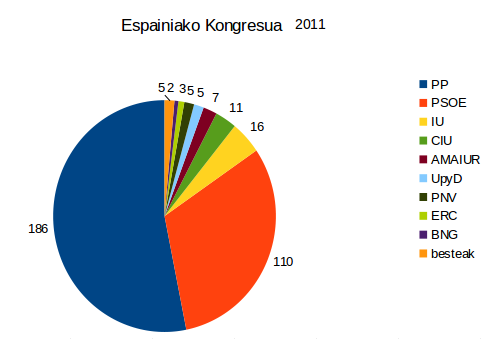 2011ko Espainiako Kongresurako hauteskundeak